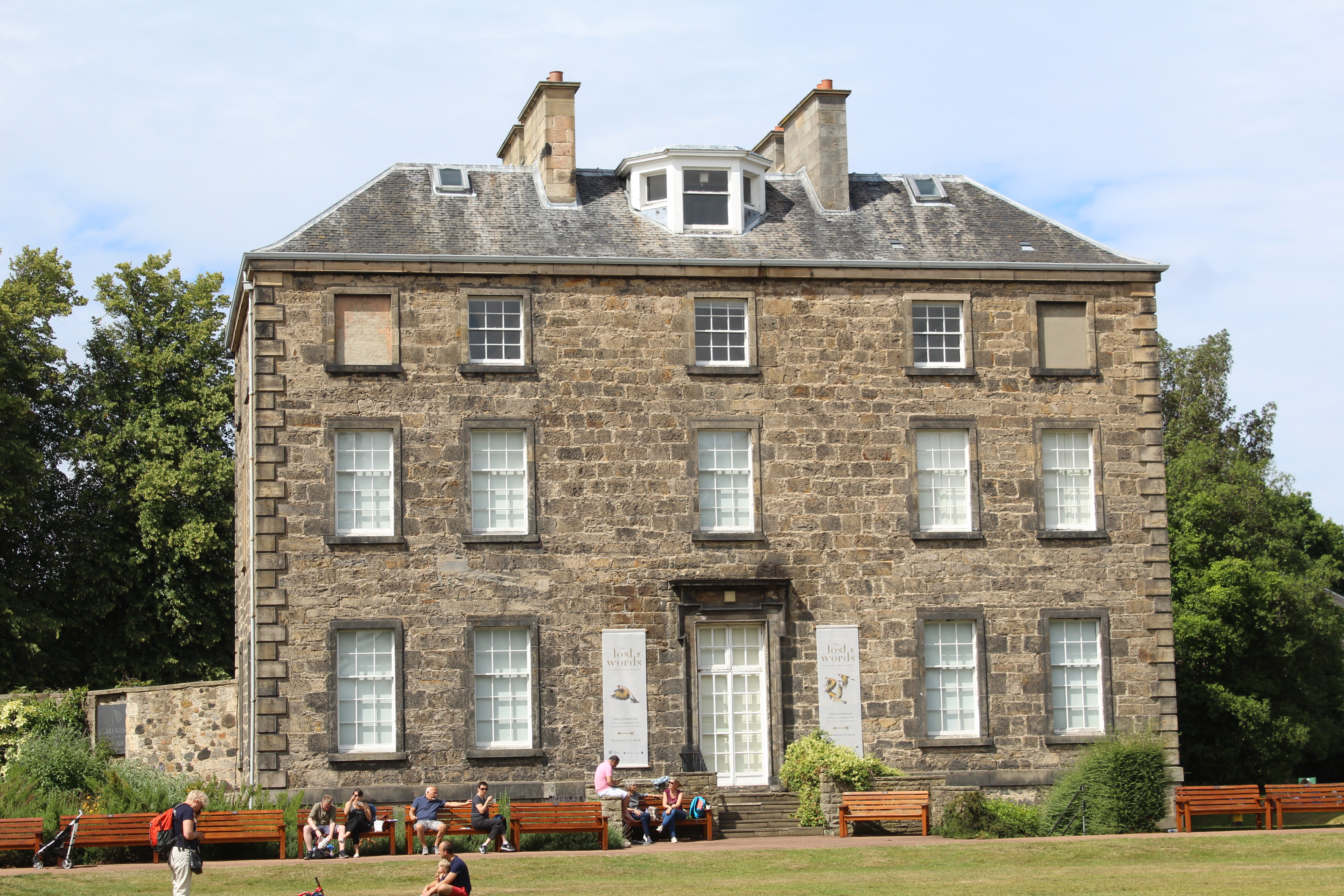 Maison Inverleith au Jardin Botanique Royal d'Édimbourg.